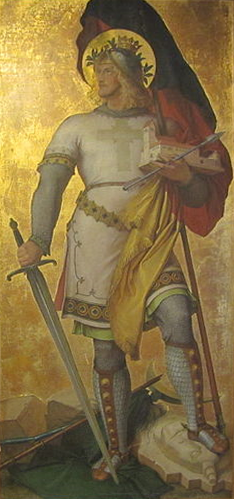 St. Johann Baptist auf dem Bussen, Tafelbild mit Gerold dem Jüngeren, 1895, von Karl Baumeister